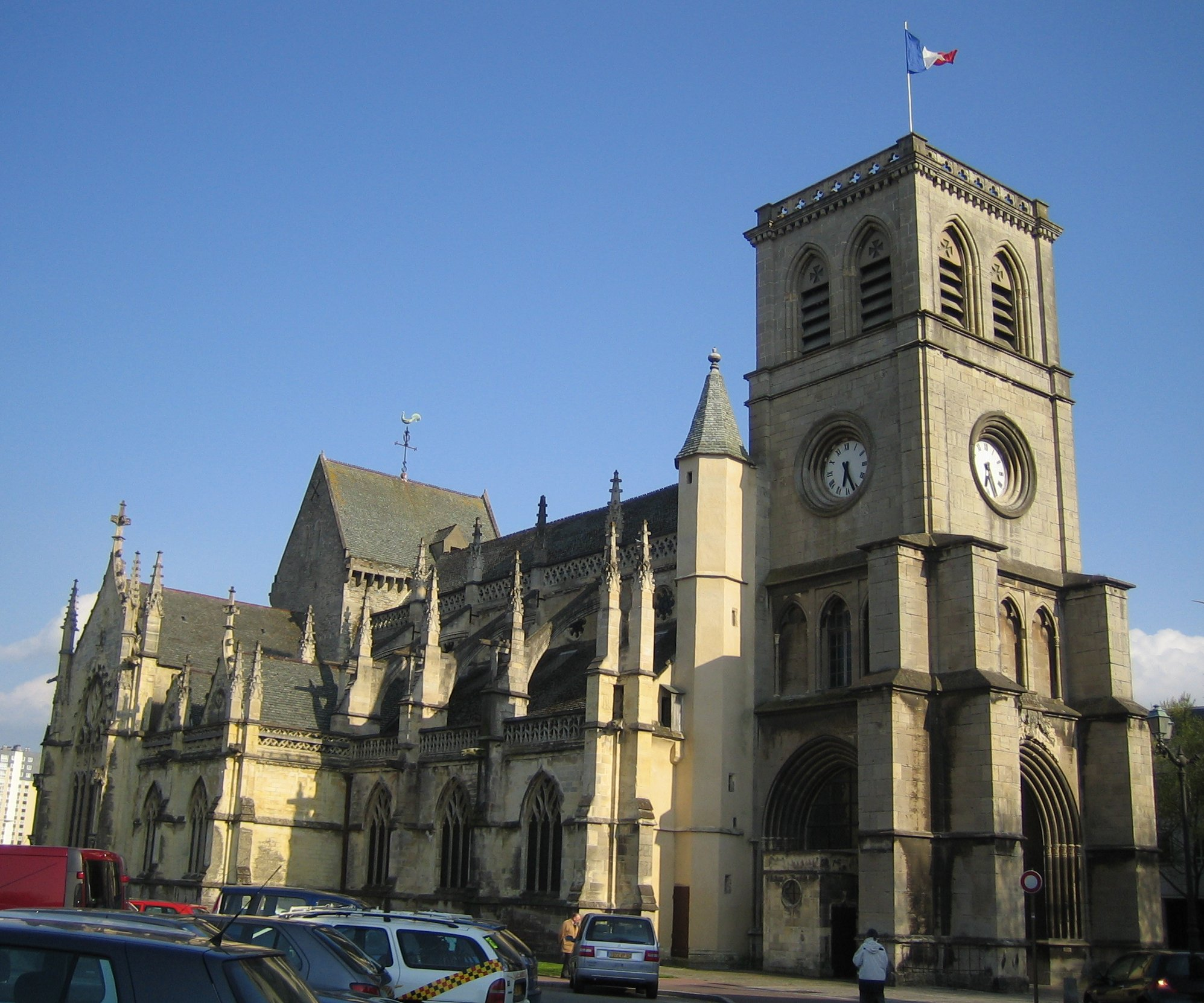 Cherbourg (France) : basilique Sainte-Trinité